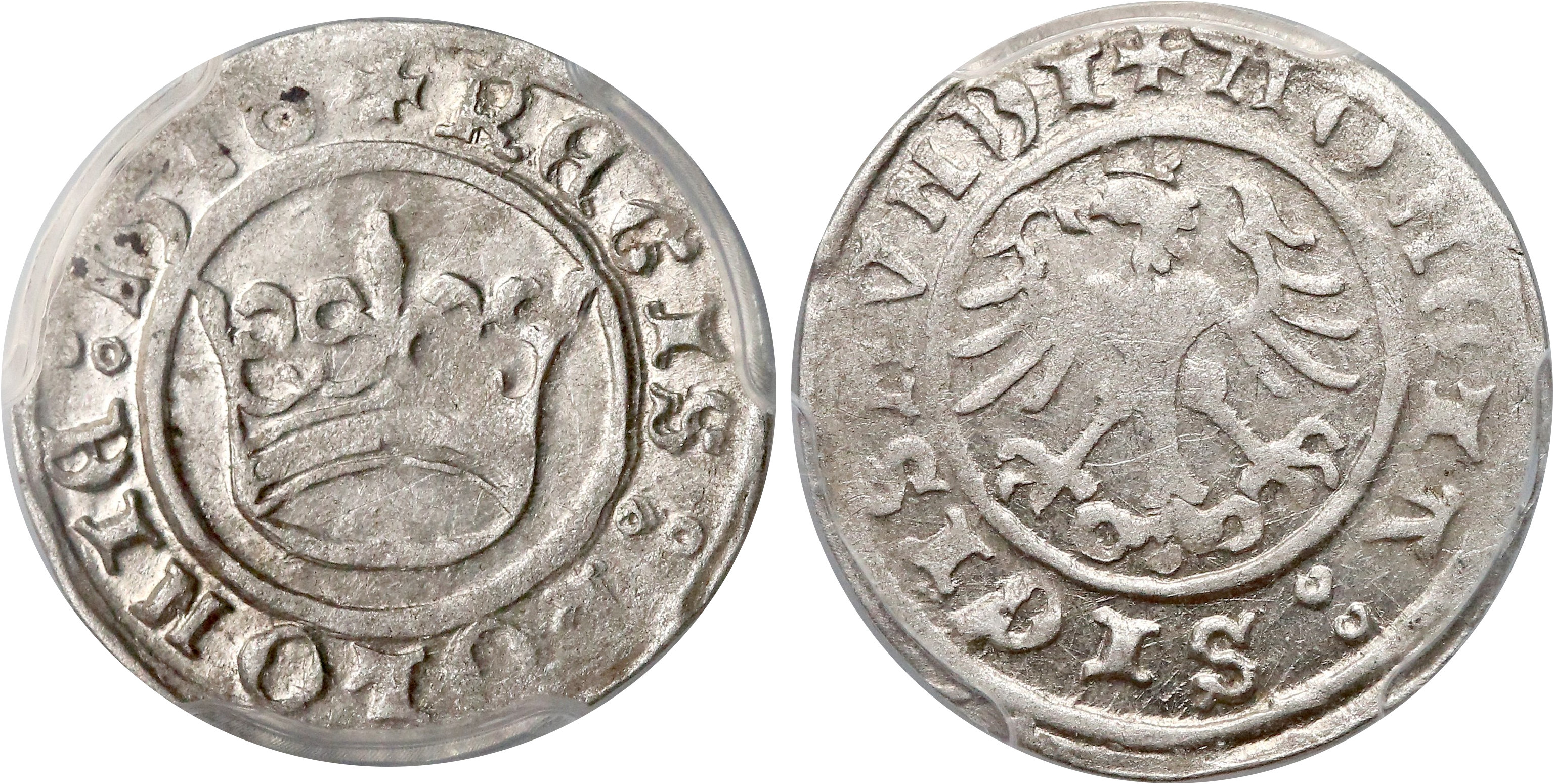 Półgrosz koronny 1510 Kraków